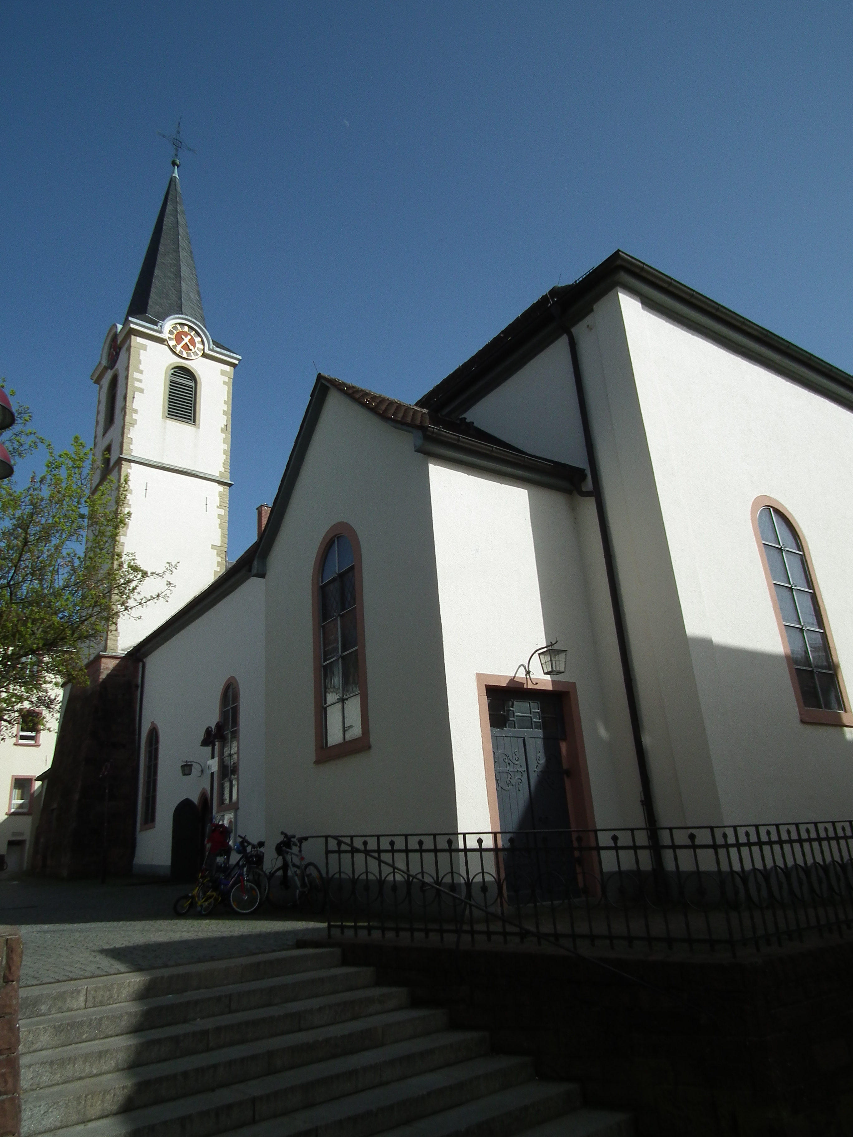 Evangelische Stadtkirche in Wiesloch (Baden-Württemberg, Deutschland)